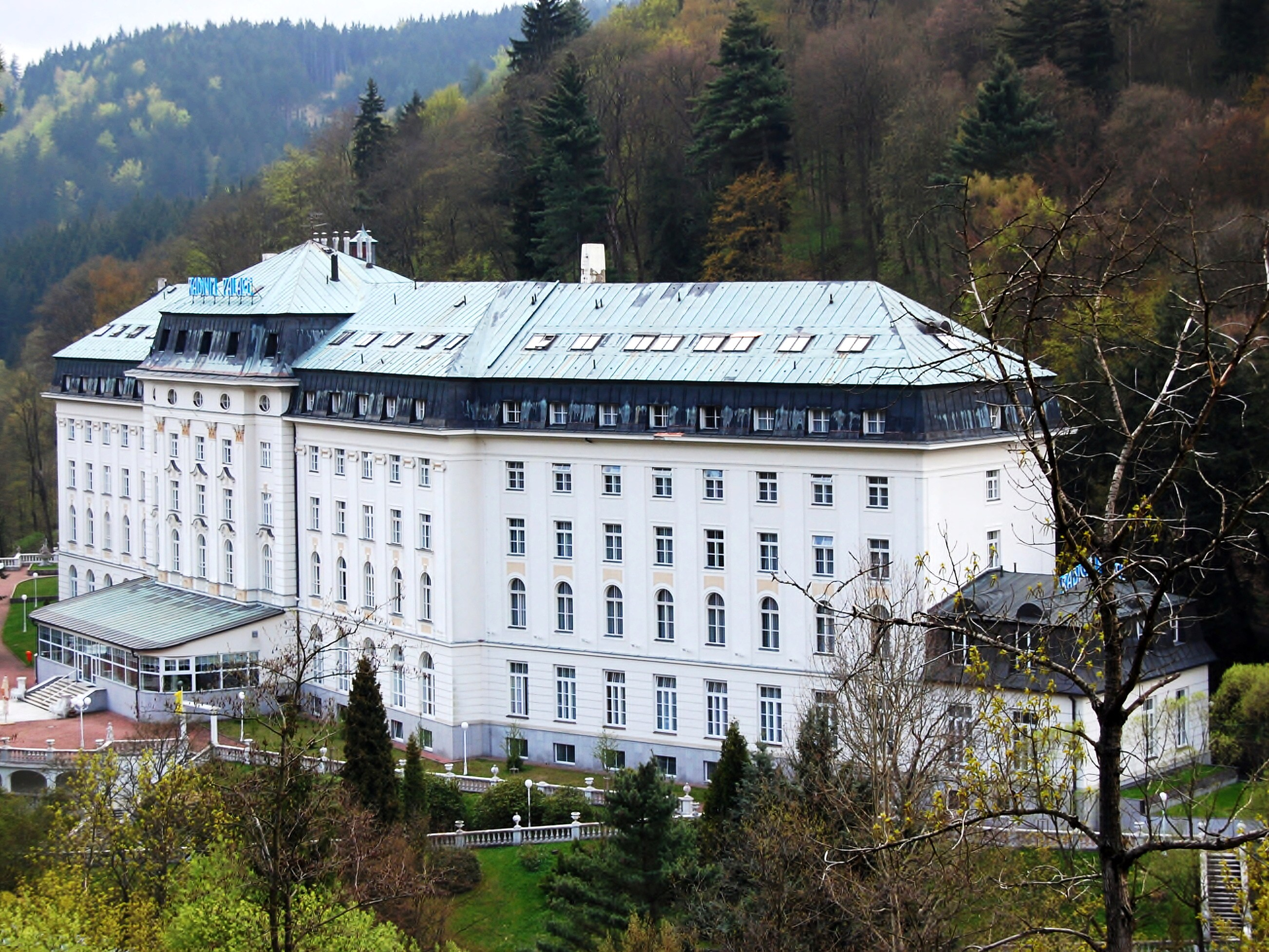 Lázeňský dům Palác Radium (Jáchymov), T. G. Masaryka 413, Jáchymov